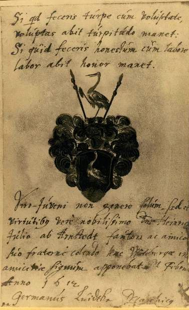 Stammbuchblatt des Stammbucheinträgers Germanus Luidtke Authority control VIAF: 52741086 GND: 12843905X